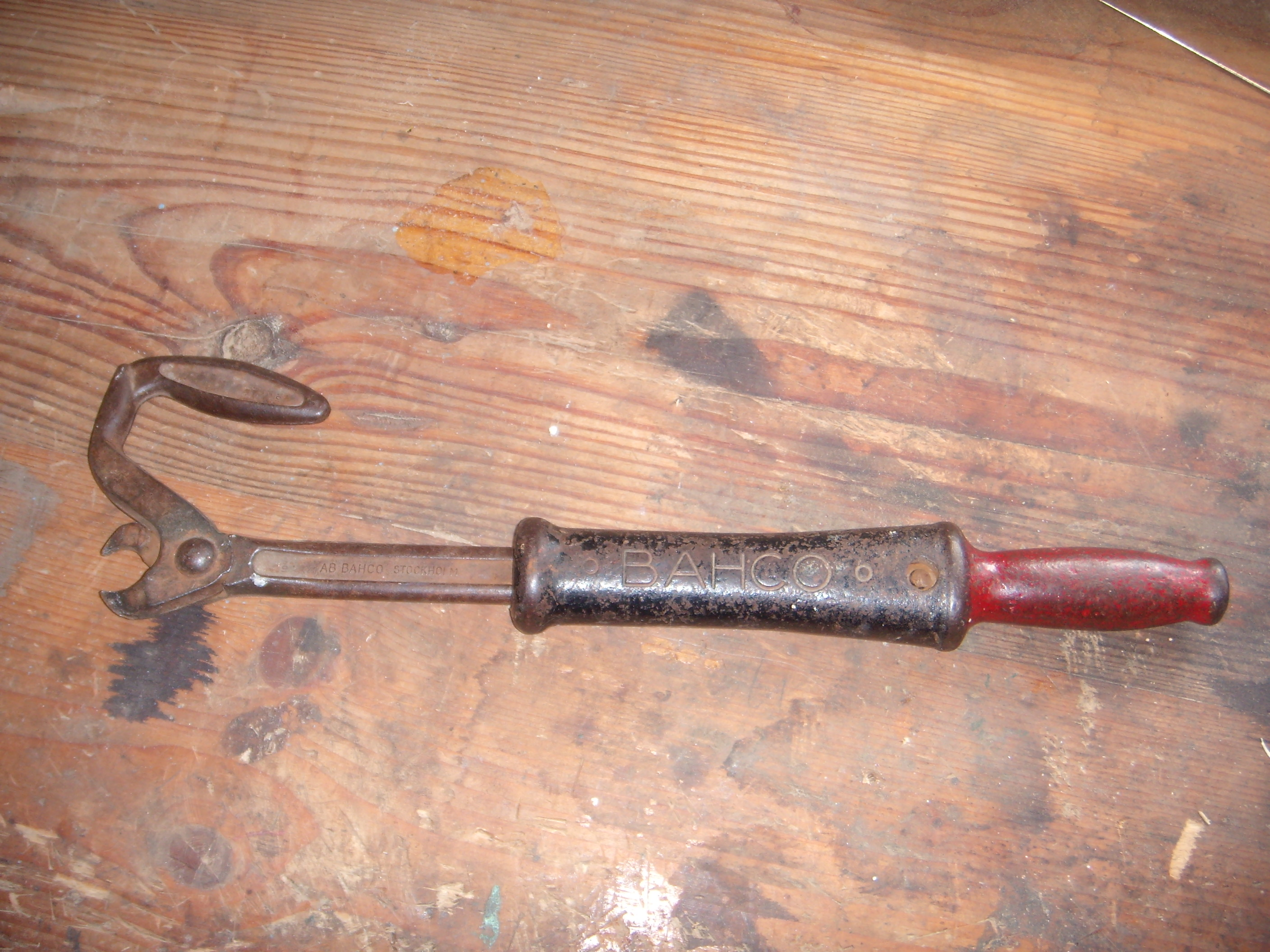 Spikutdragare